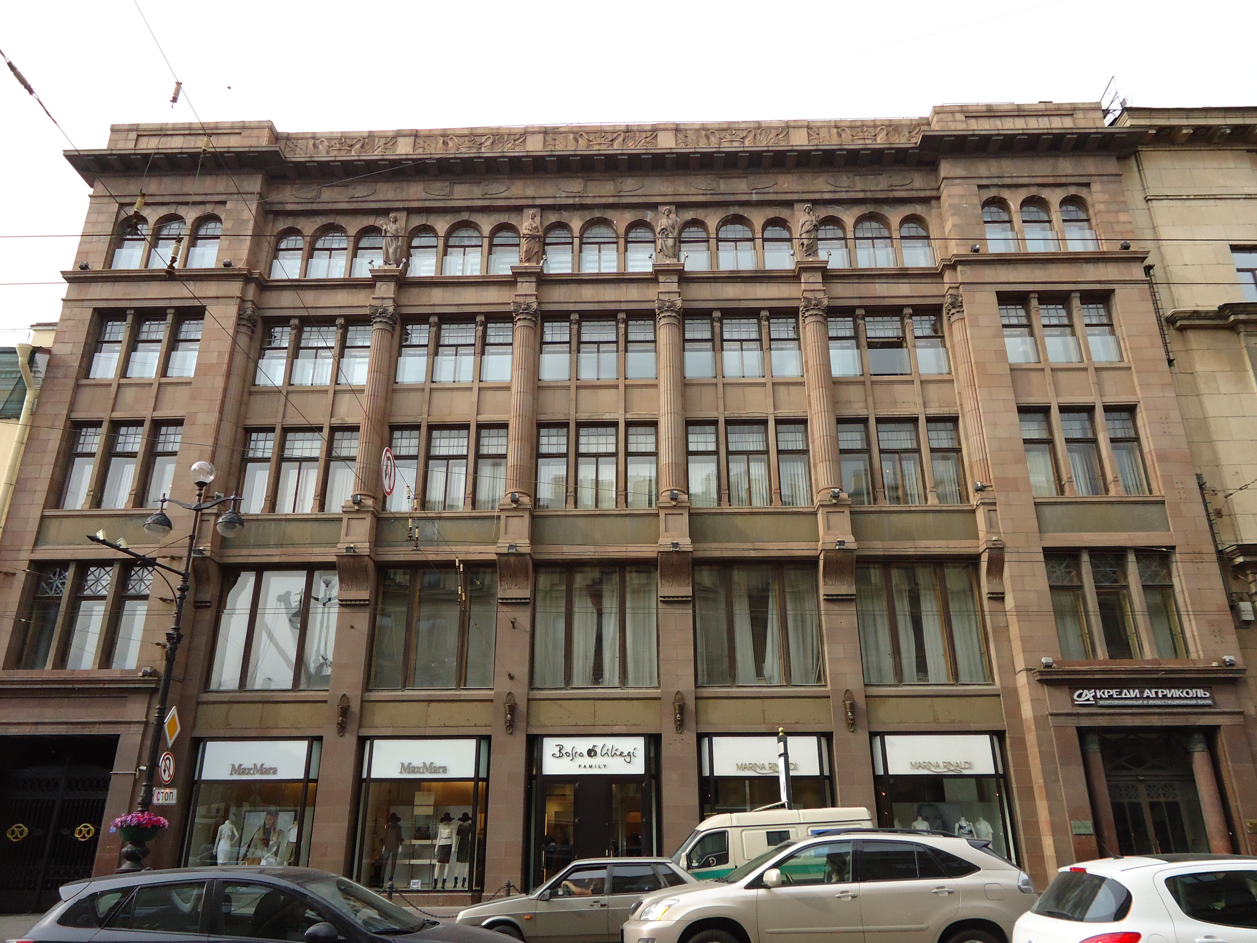 Здание филиала Московского банкирского дома «И. В. Юнкер и Ко»